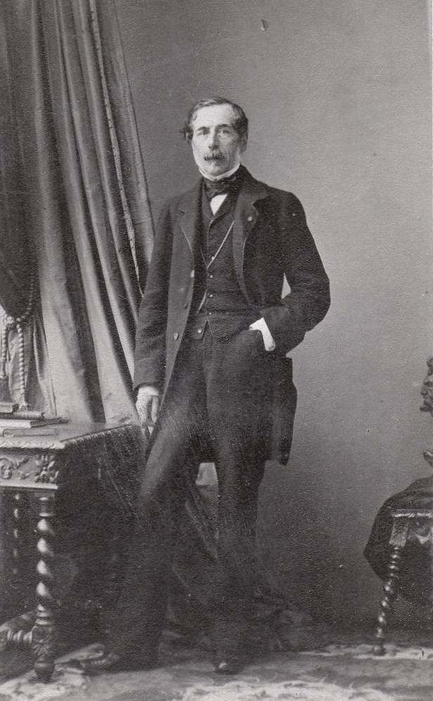 Мари Мельхиор Жозеф Теодор де Лагрене (1800—1862) — французский дипломат